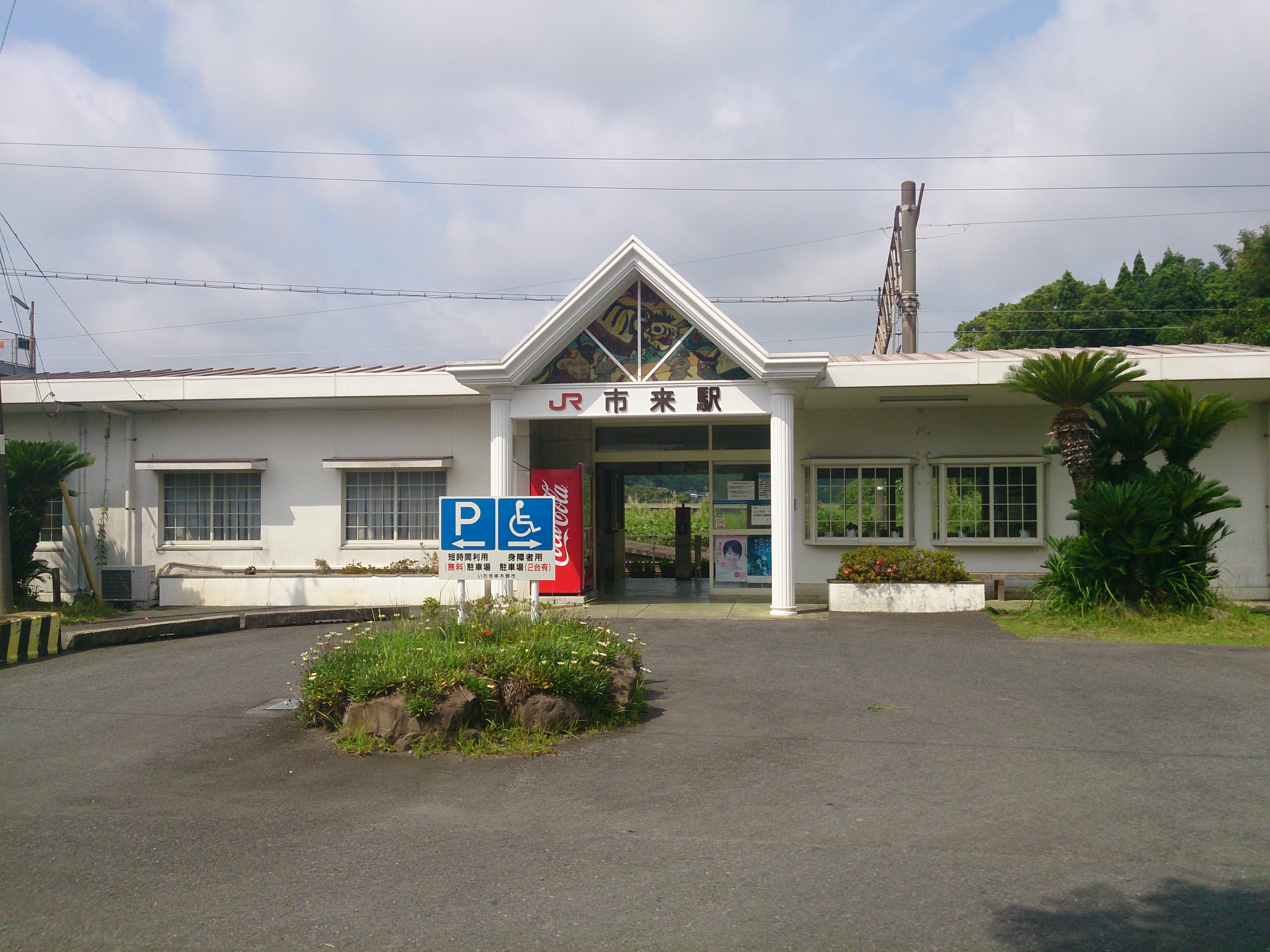 市来駅駅舎